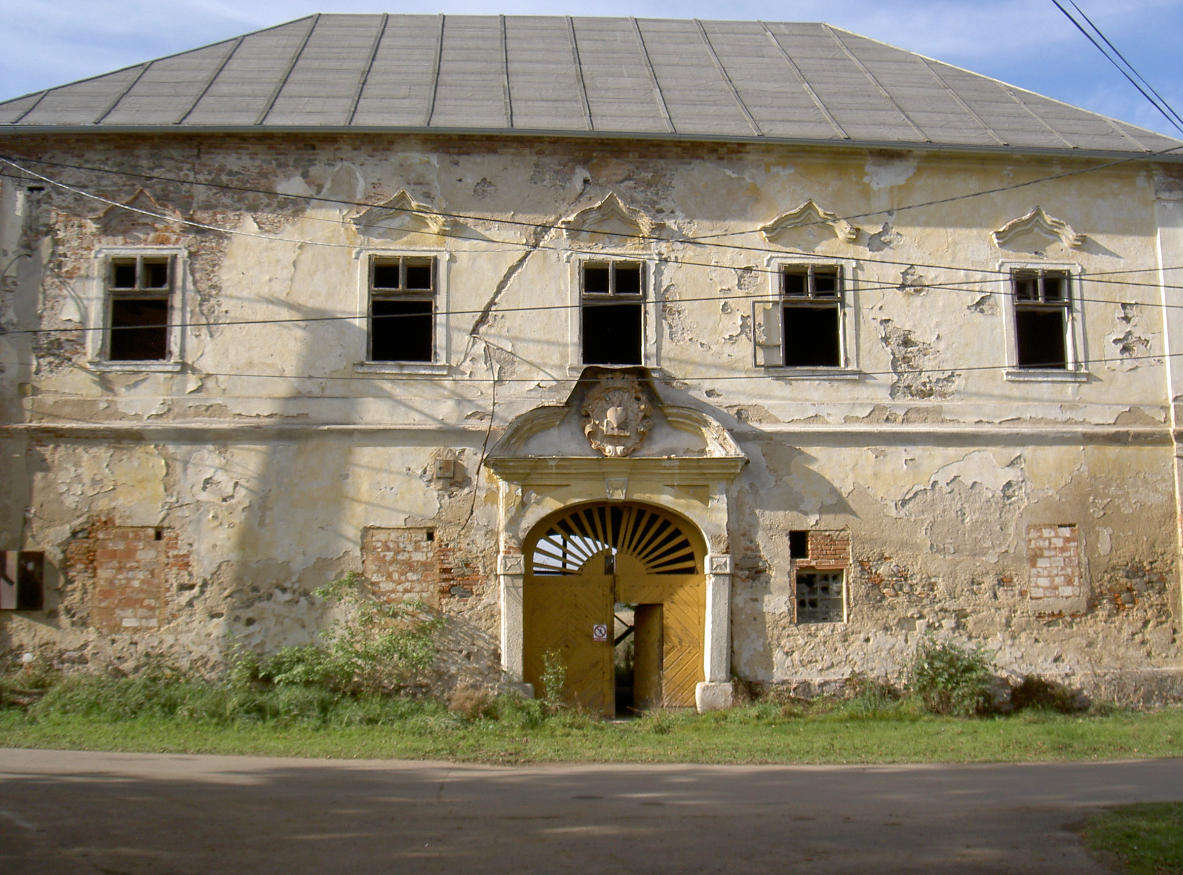 Schloss in Ždánov (okres Domažlice), ehemals zum Augustinerkloster Pivoň gehörig